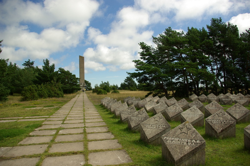 Tehumardi lahingu mälestusmärk Saaremaal.